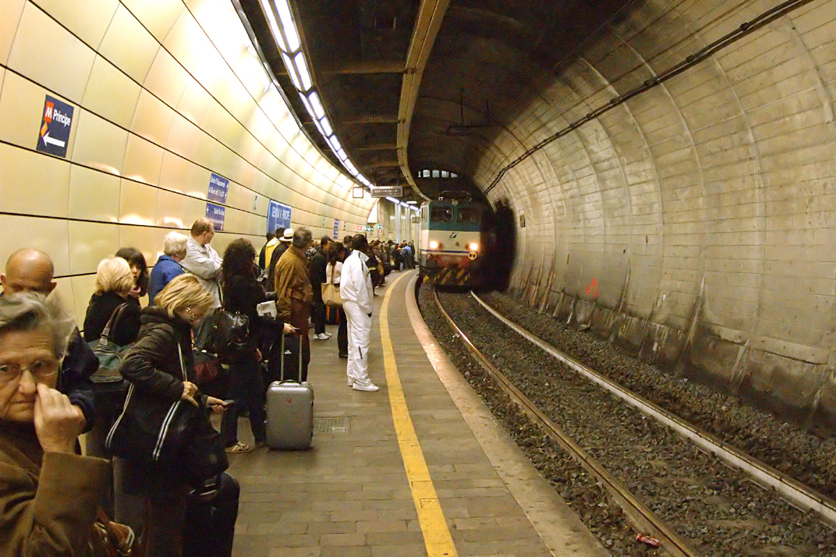 La stazione sotterranea di Piazza Principe, Genova Underground Principe Station, Genoa 1600 iso